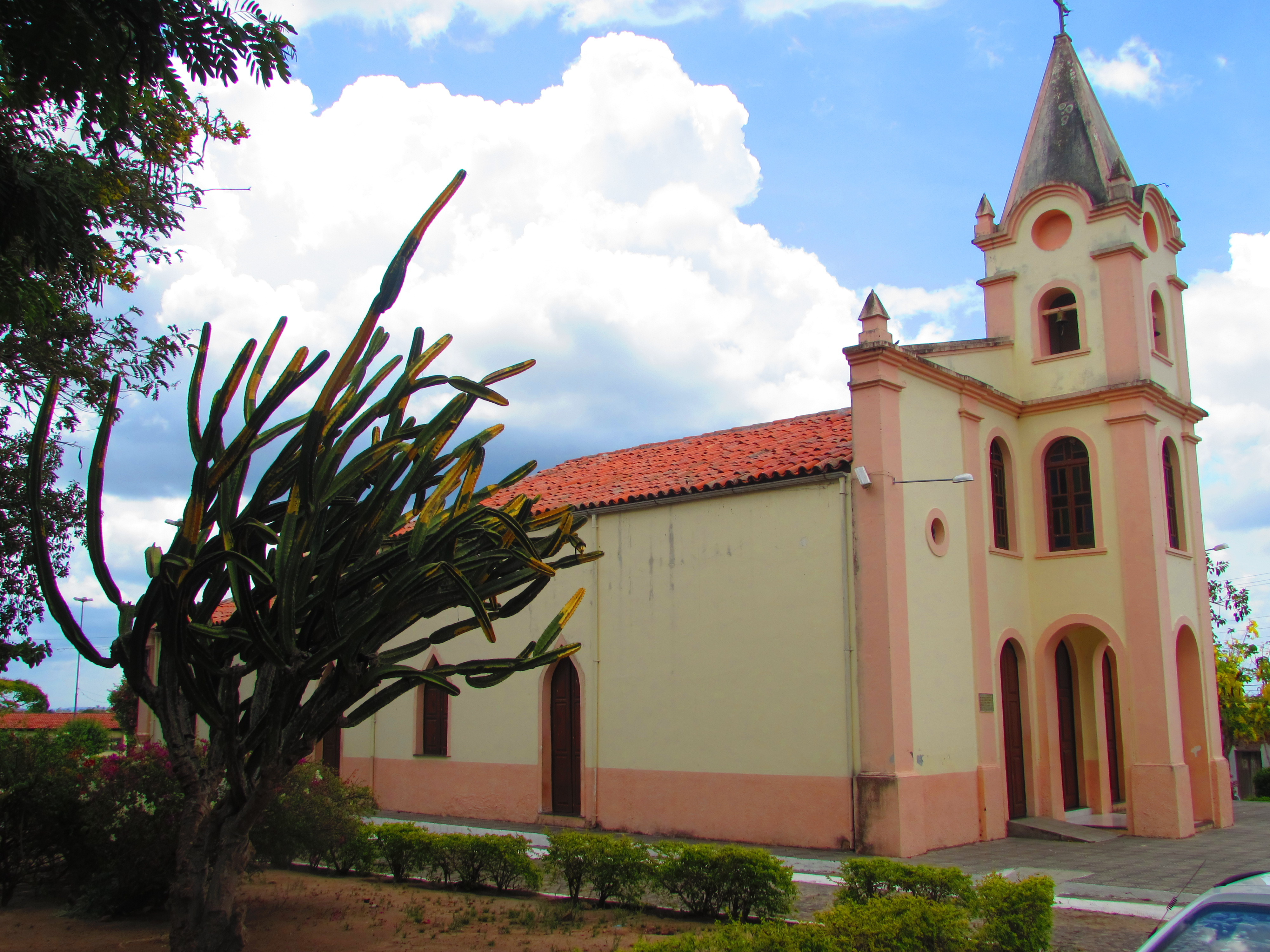 Igreja